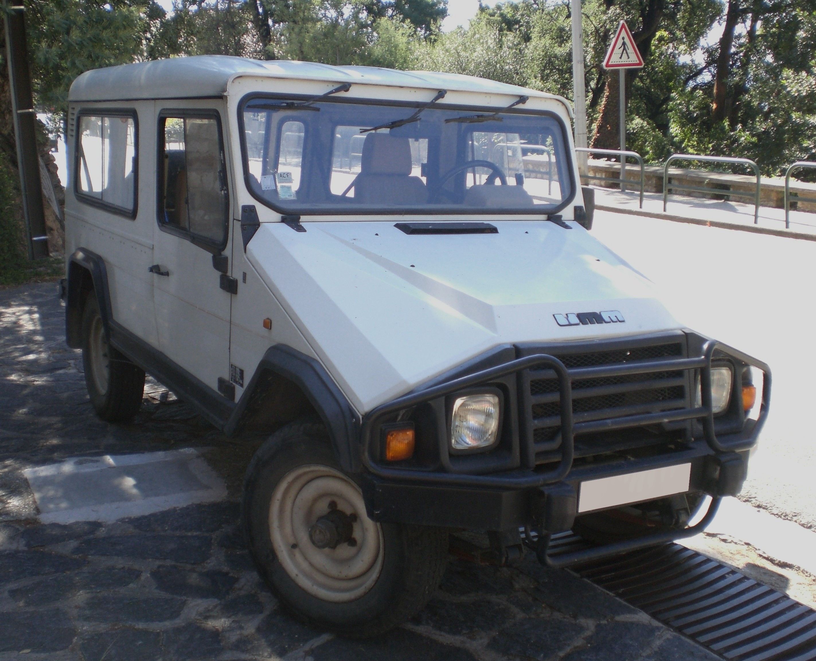 UMM ATV Alter Front